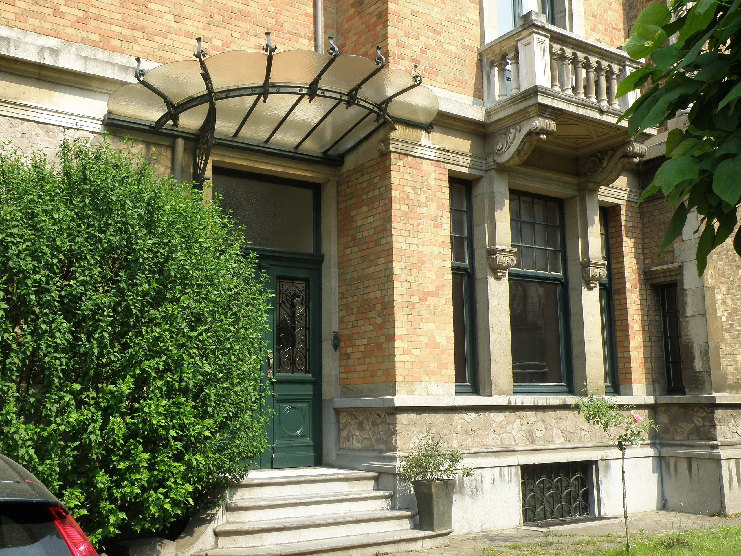 Anvers, Belgique. Ensemble symétrique de quatre maisons individuelles de style néo-gothique vénitien, dénommé Scaldis (nom latin de l’Escaut), sis aux n° 65 à 71 de la Cogels-Osylei, dans le quartier Zurenborg. Porte d'entrée. Archit. Frans Van Dijk, 1903.